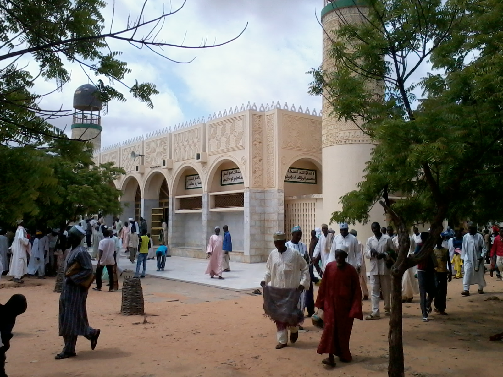 Mosque de Tchana Maradi